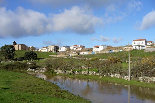 Río Tumbafrailes a su paso por Buenamadre